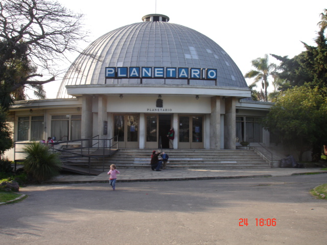 Planetario Municipal Agrimensor Germán Barbato, Montevideo, Uruguay; fue el primer planetario de Latinoamérica, abierto en 1995, y anexo al Zoológico Villa Dolores (está situado en el barrio montevideano del mismo nombre, Villa Dolores).